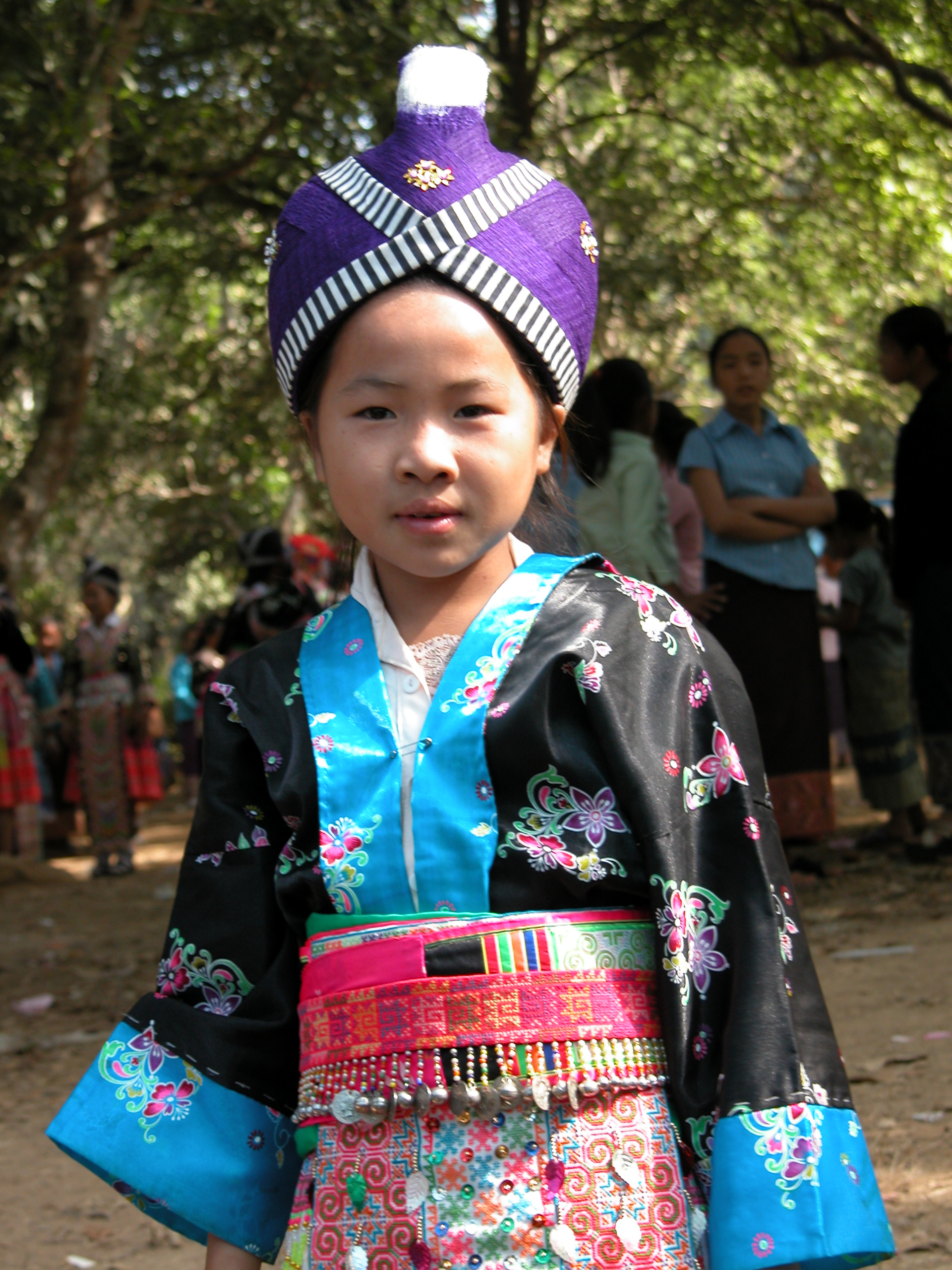 laos luang prabang, fillette lors d'une fete de rencontre hmong